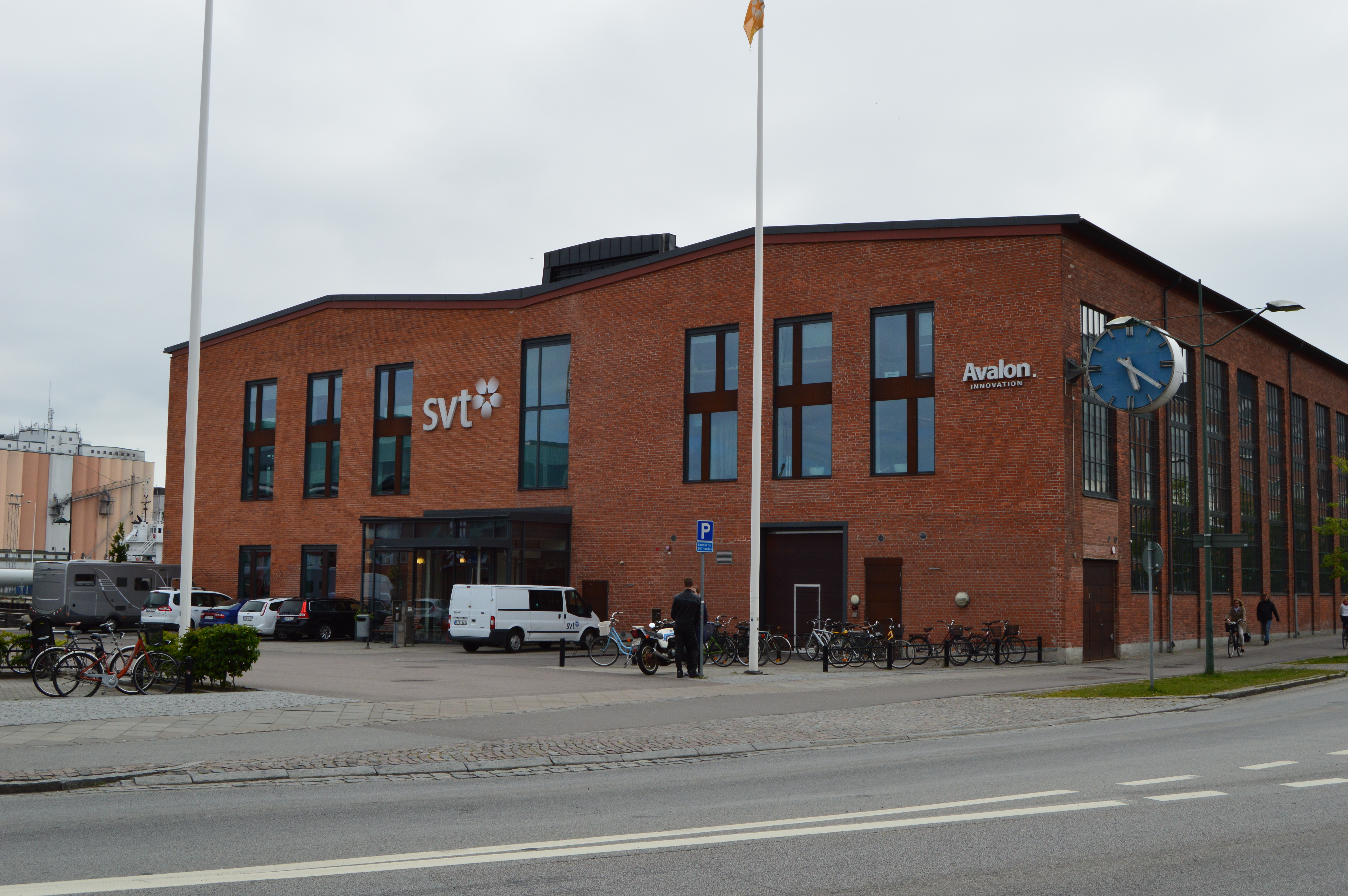 SVT:s lokaler i Malmö.